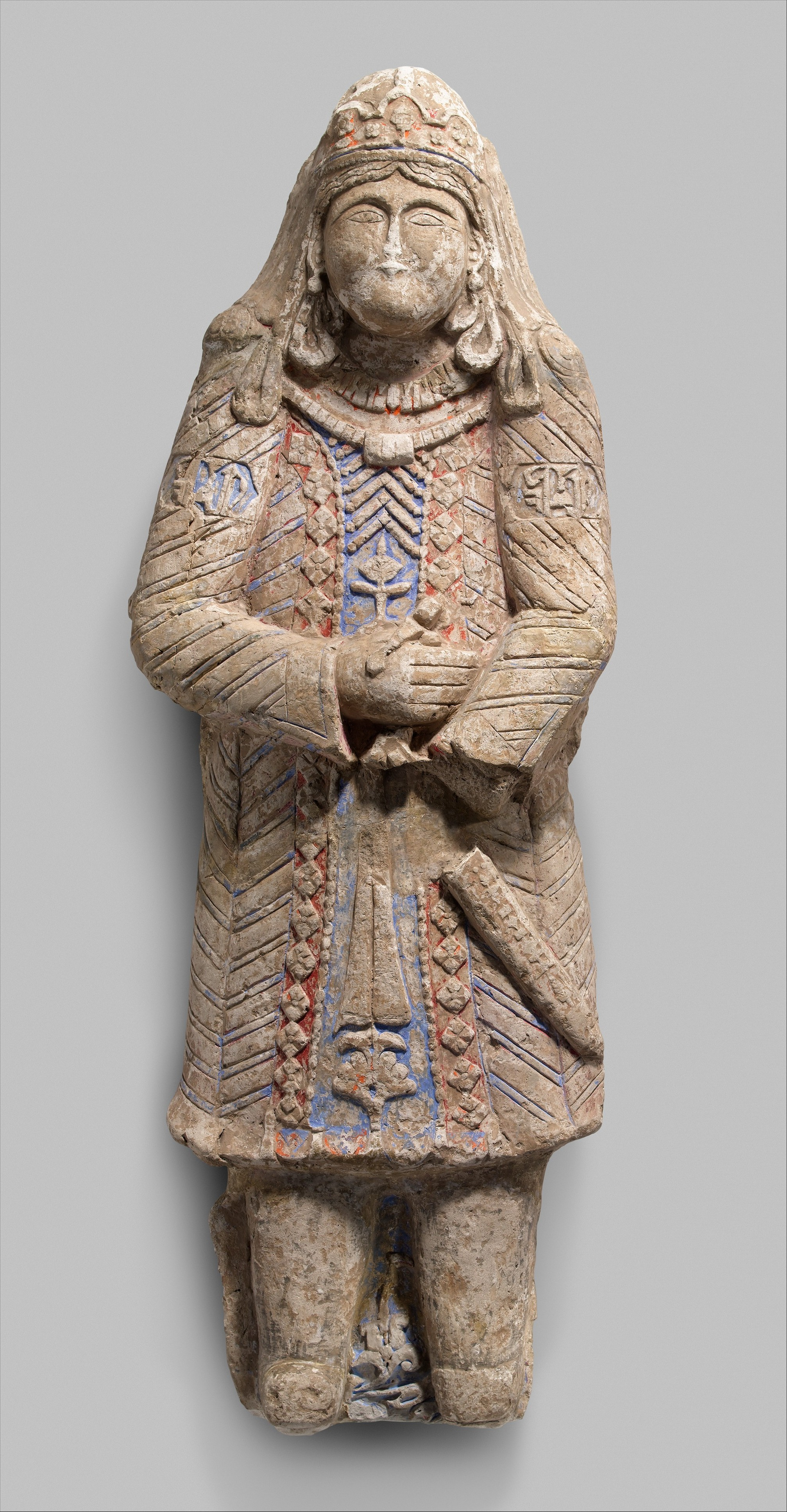 Figure; Sculpture